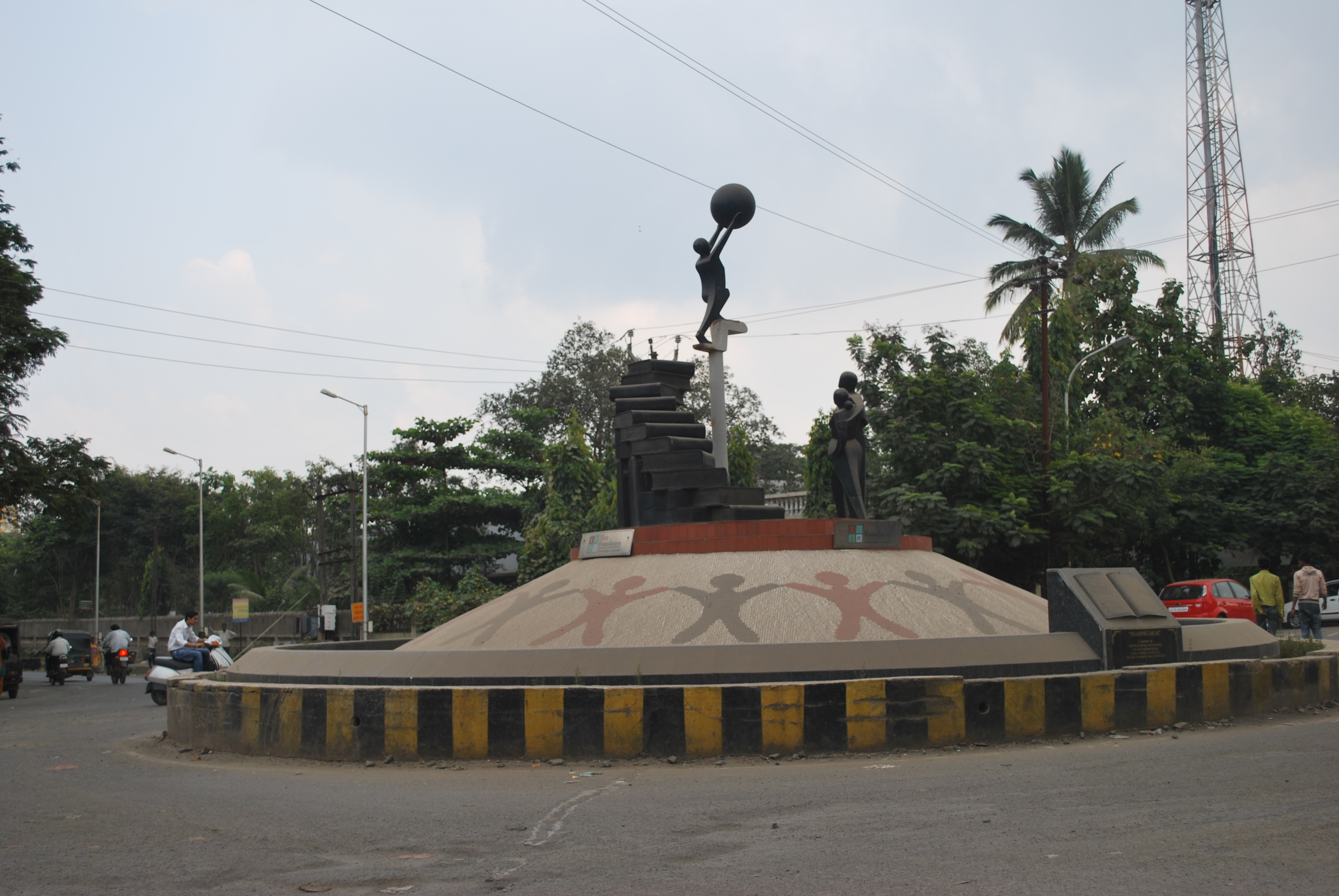 Koparli Road Circle, Near GIDC Garden, Vapi, Valsad